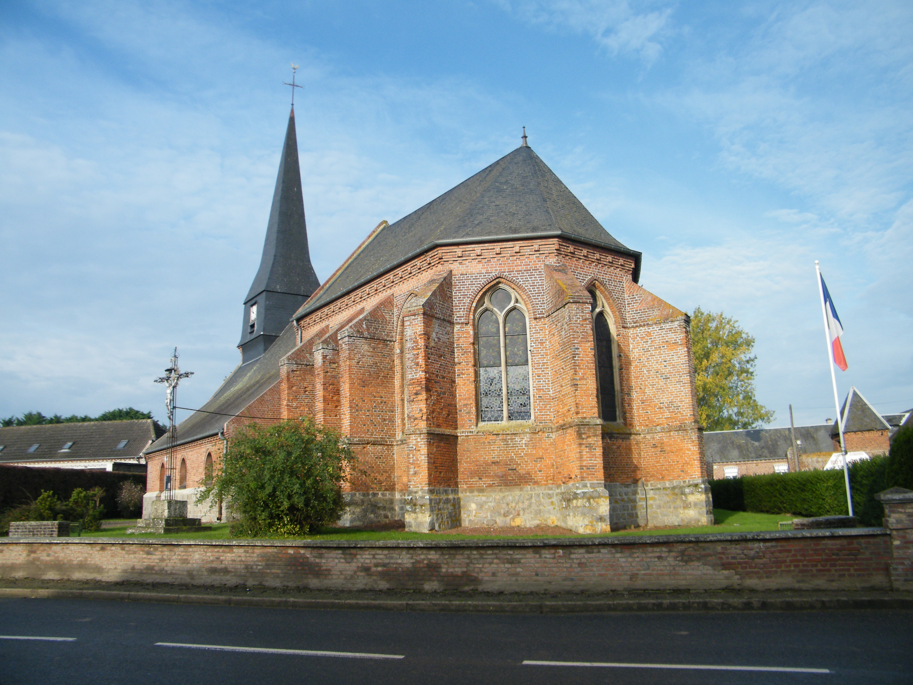 église.